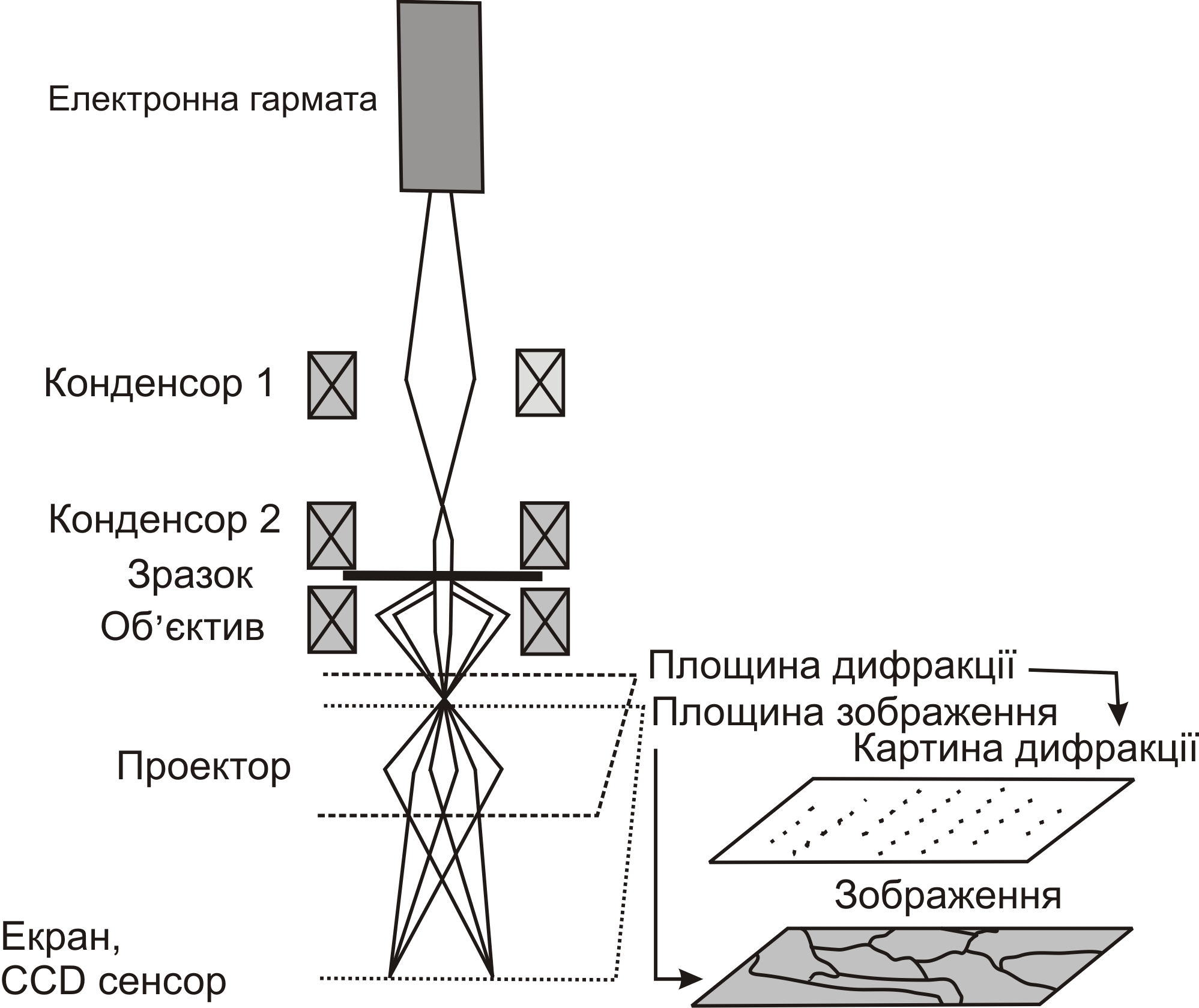 схема ТЕМ: схема ТЕМ